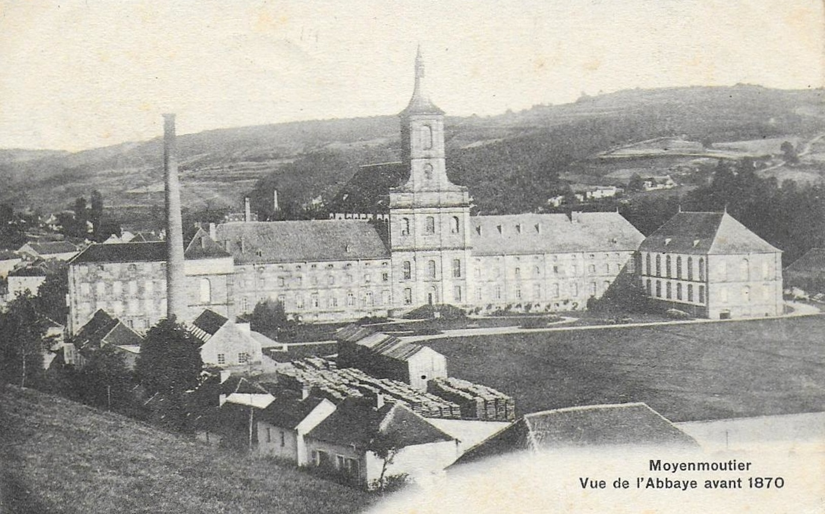 Abbaye de Moyenmoutier au début du XXème siècle ; l'usine textile n'est pas encore construite devant l'édifice